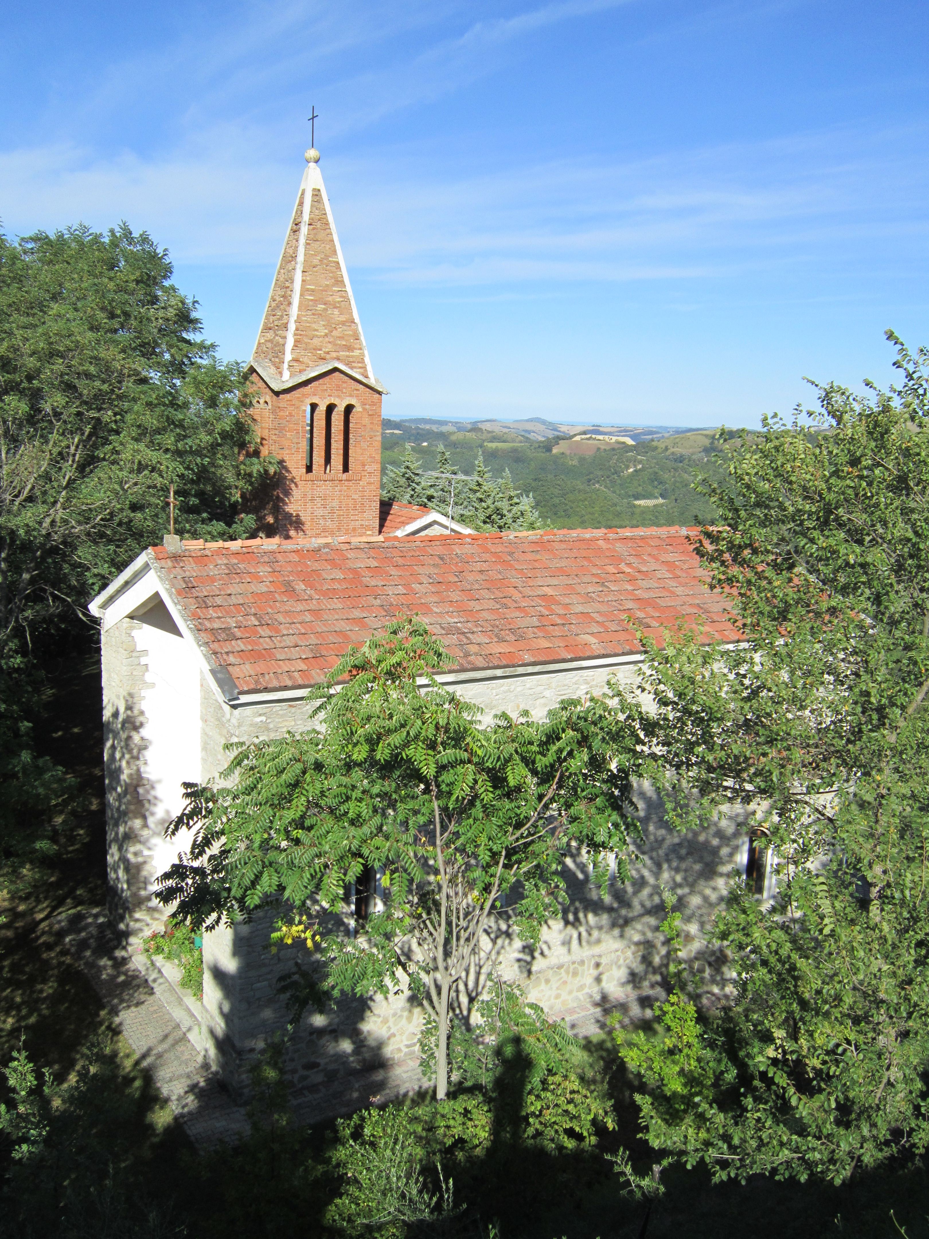 Chiesa di Calboli, foto propria